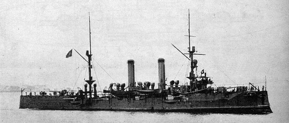 Der brasilianische Kreuzer Barroso